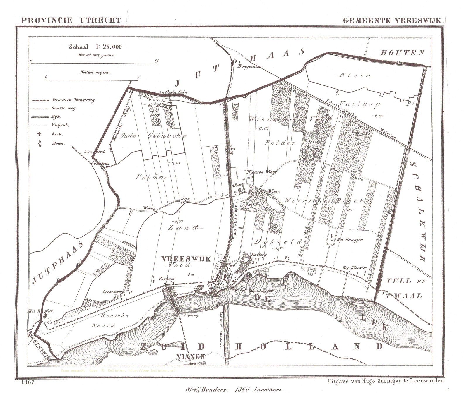 Kaart van Vreeswijk uit Gemeente Atlas van Nederland, J. Kuyper 1865-1870, Uitgave Hugo Suringar Leeuwarden.